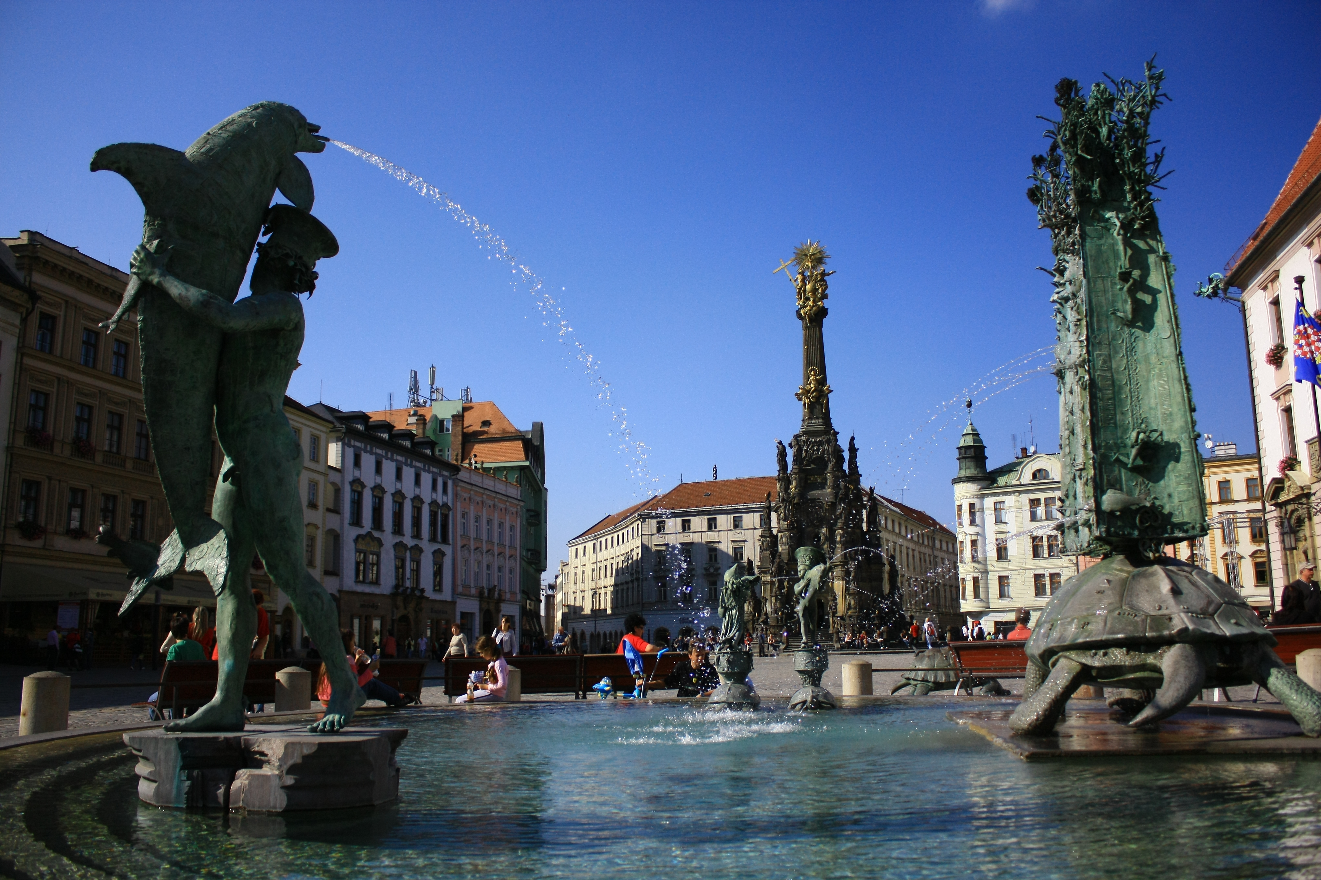 Olomouc